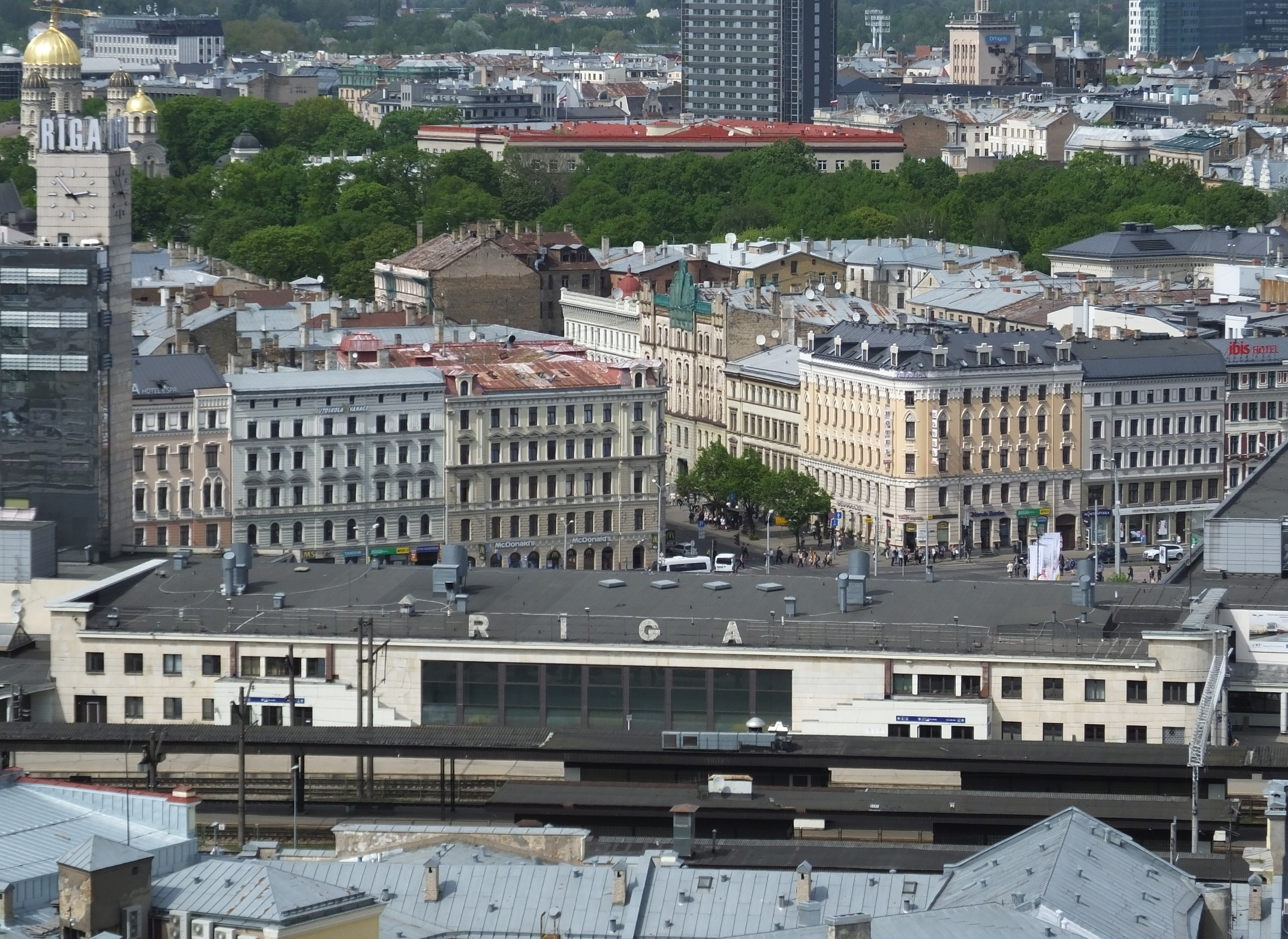 Centrum Rygi z dworcem kolejowym widziane z gmachu Łotewskiej Akademii Nauk